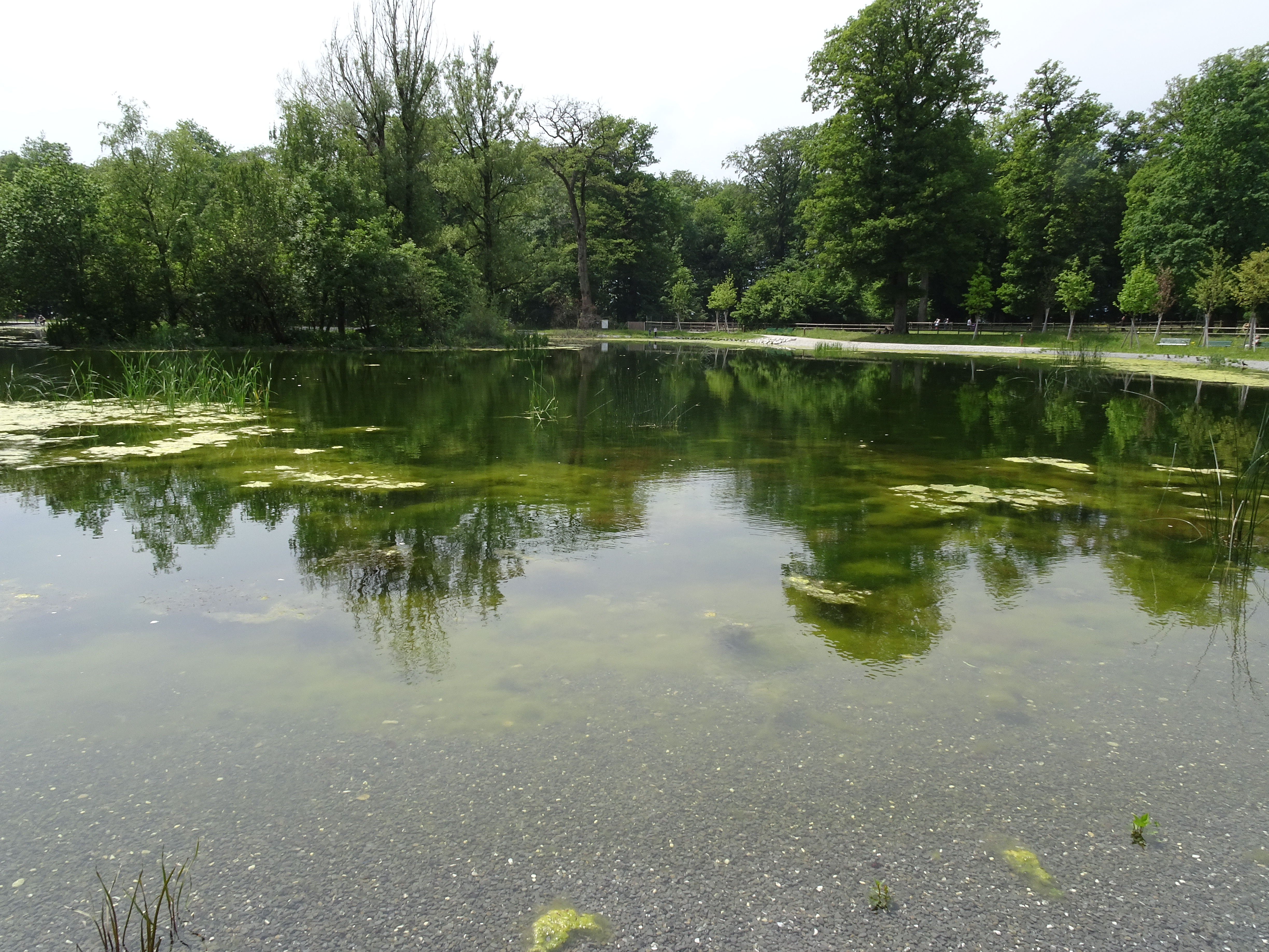 Lac de Sauvabelin, Lausanne, Šveits